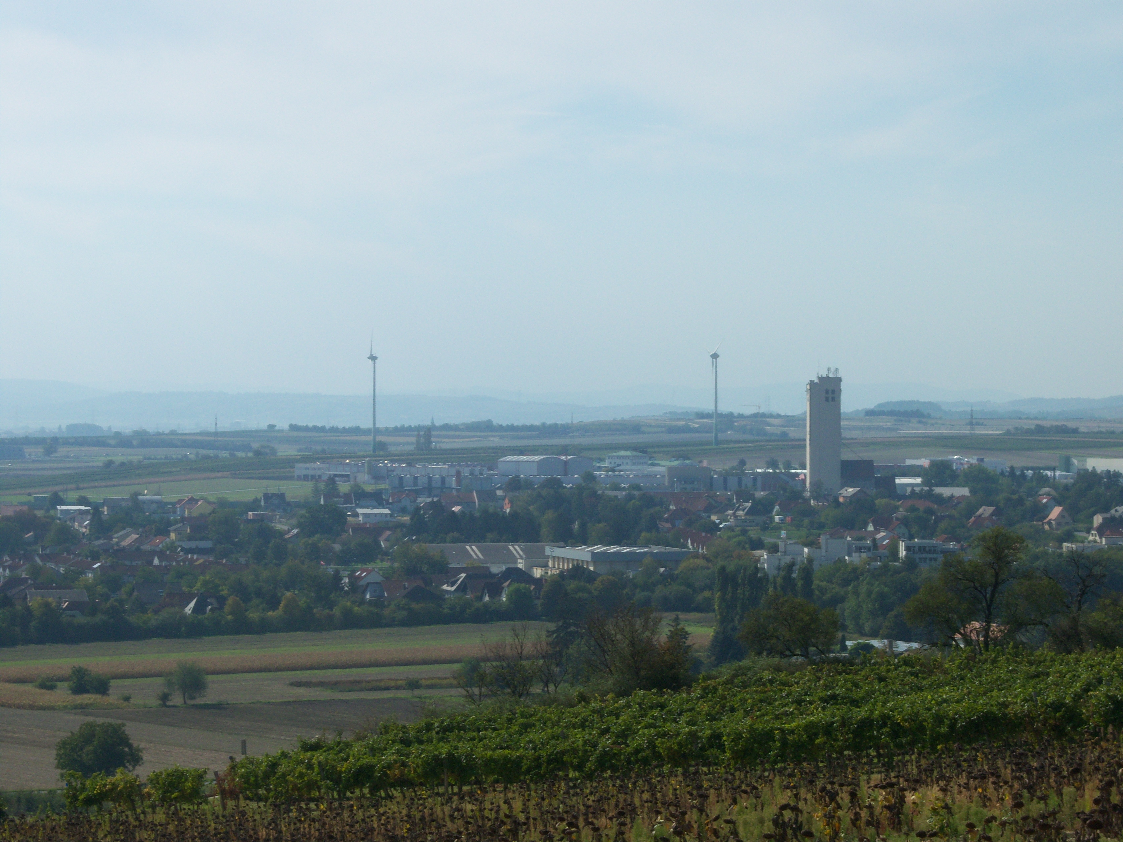 Wolkersdorf Panorama